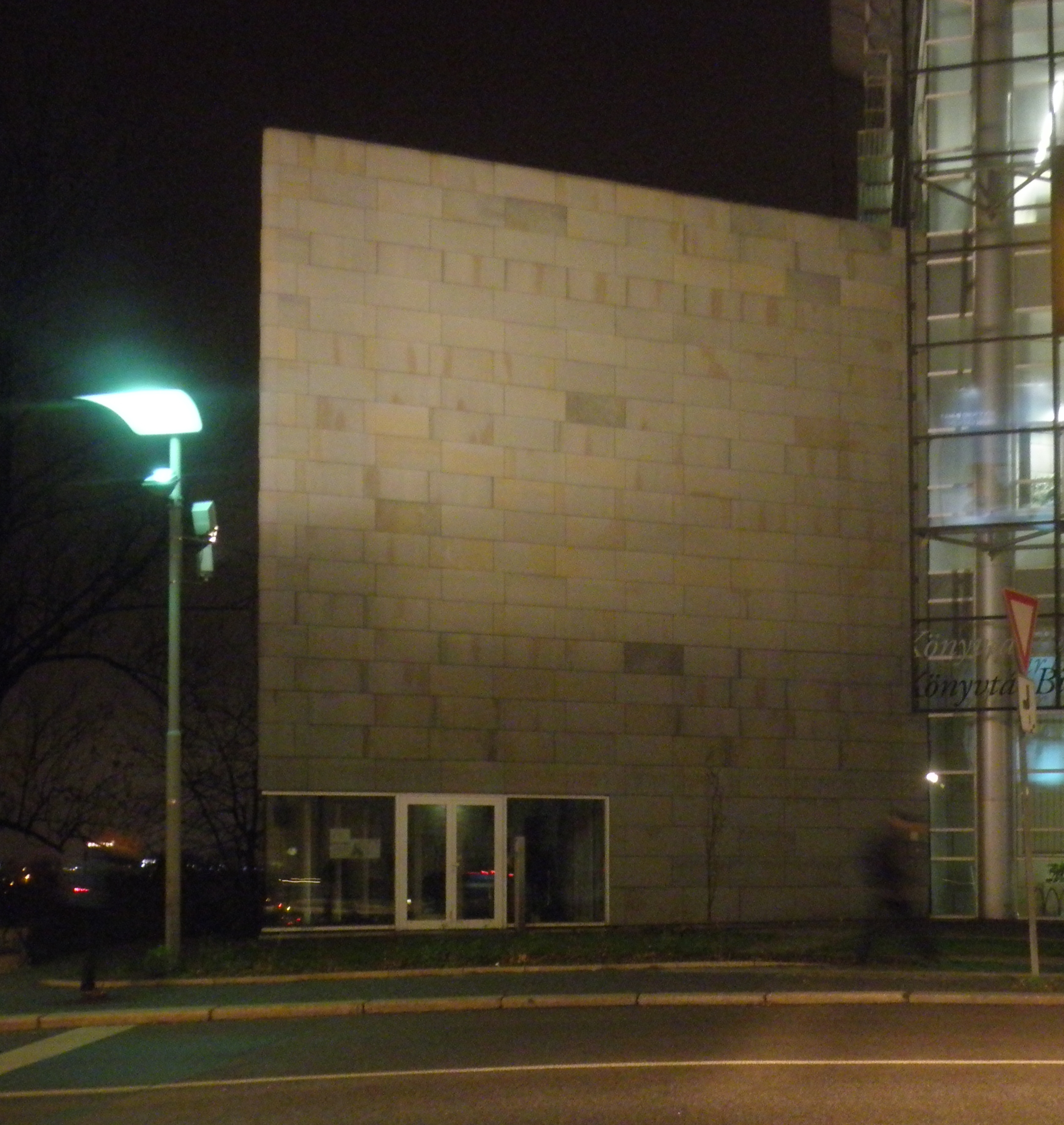 Synagoga v Liberci sousedí s knihovnou.